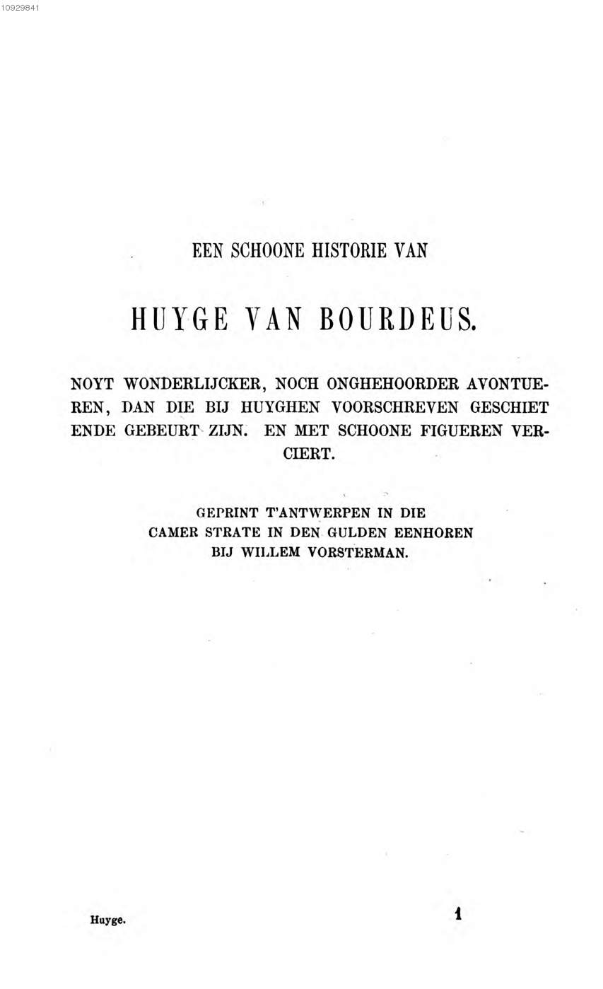 Se trata de la portada de “Una linda historia por Huyge van Bourdeus...” libro popular de los países bajos, editado en 1869 por la Biblioteca de la Asociación literaria de Stuttgart. El título alternativo es: " :“Een schoone historie van Huyge van Bourdeus. Noyt wonderlijcker, noch onghehoorder avontueren, dan die bij huyghen voorschreven geschiet ende gebeurt zijn. En met schoone figueren verciert“ . Este archivo es en realidad la página 3 de la digitalización.